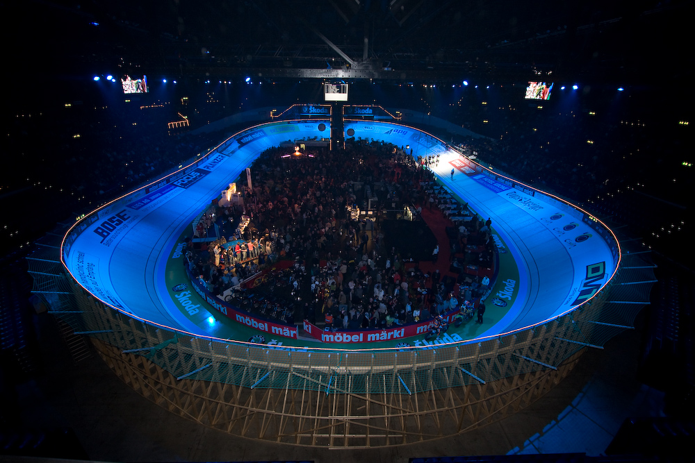 Sixdays Zürich-76